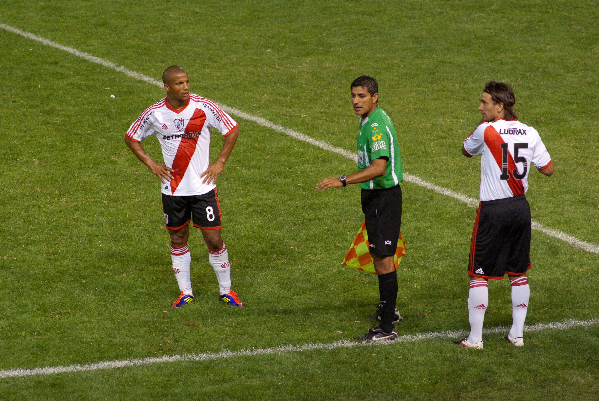 Sale Sanchez, entra Ponzio